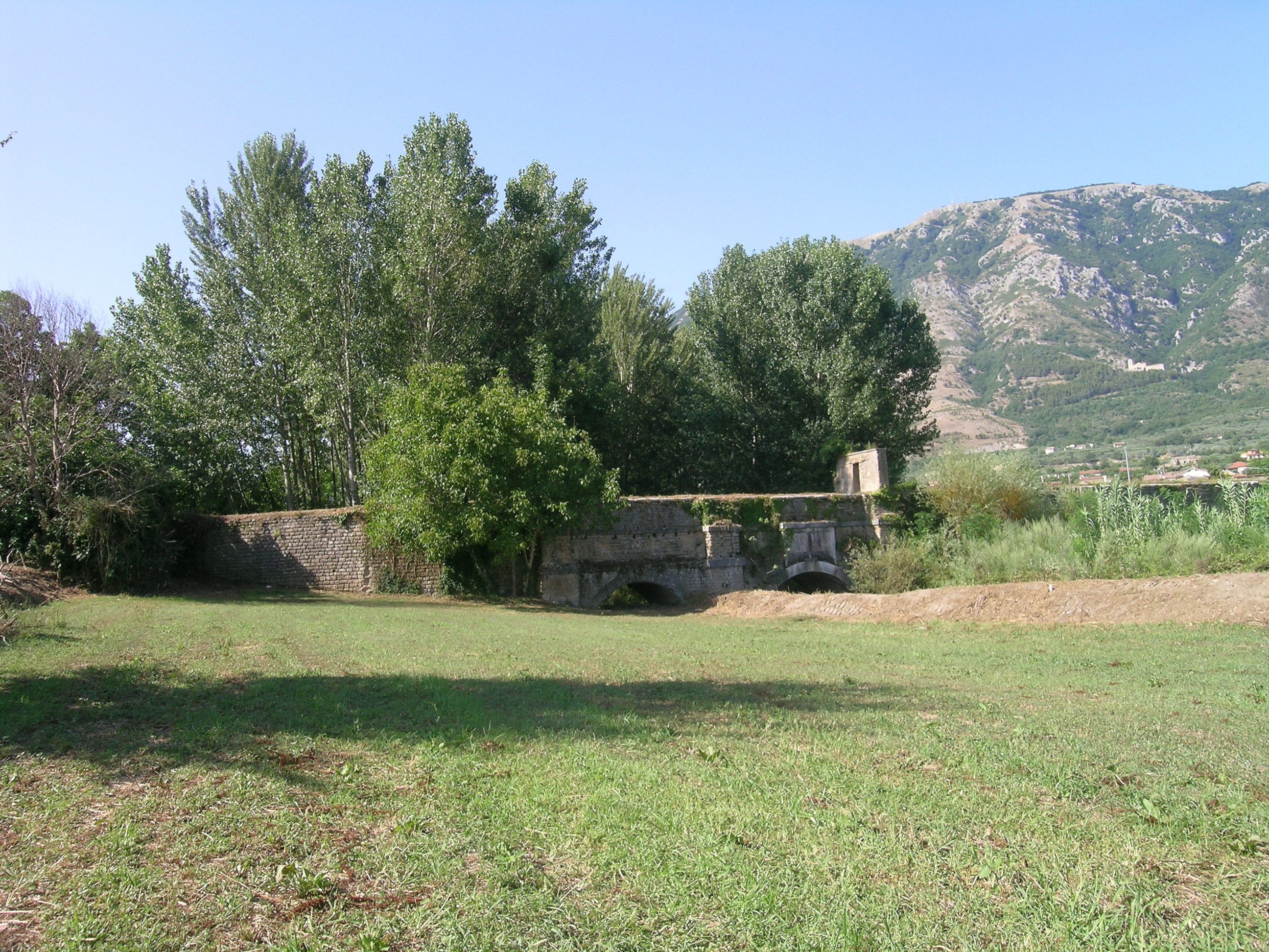 Primo ponte dei tre ponti dell'Acquedotto Carolino, scavalca con 4 archi il fiume Isclero (prima Faenza), a confine tra i comuni di Bucciano e Moiano